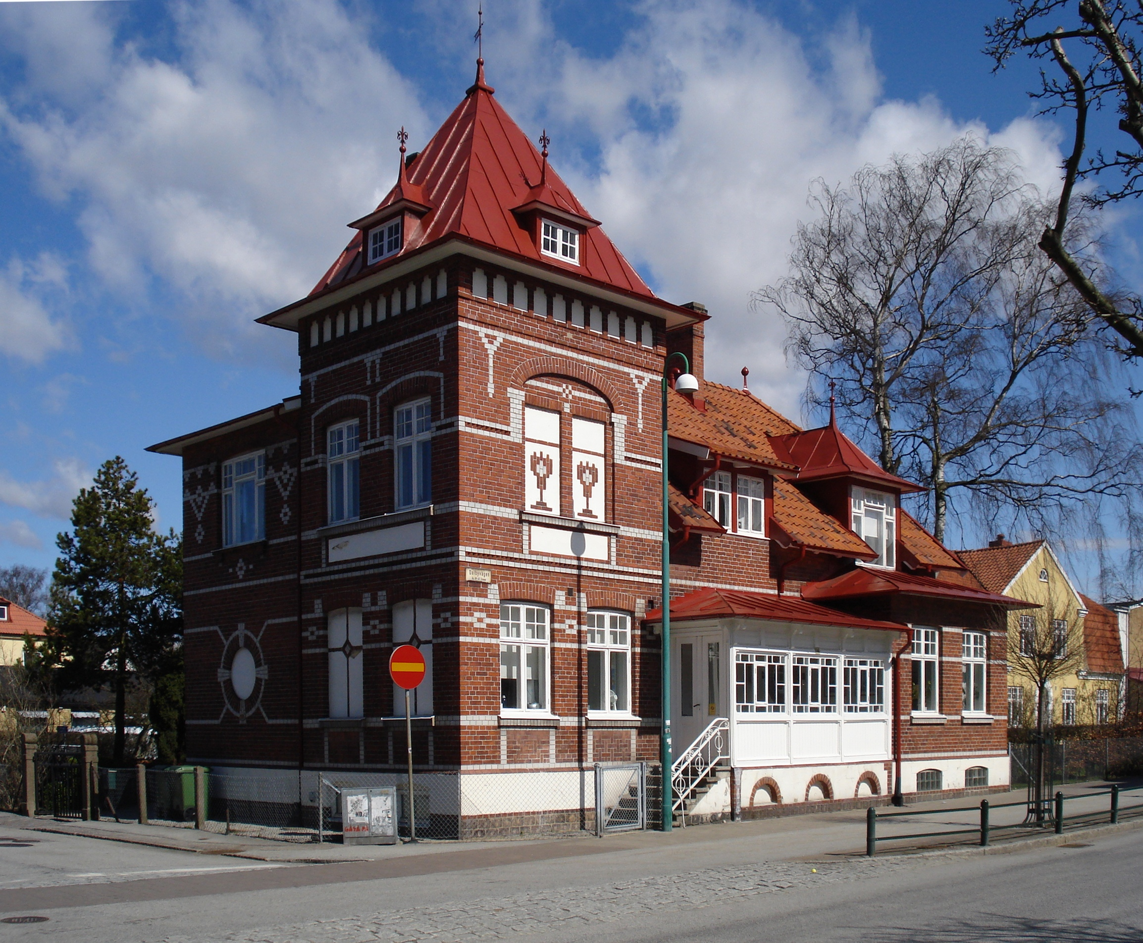 Arlöv. Möllerstedska huset, Dalbyvägen 16. Ritat och byggt 1905 av Herman Möllerstedt.